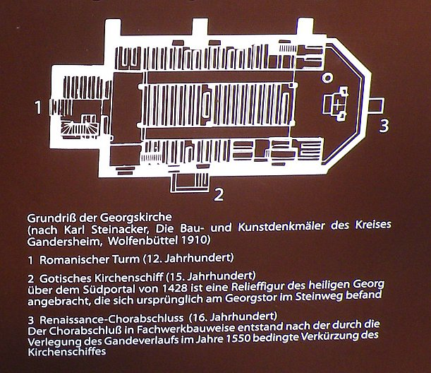 Grundriss und Beschreibung der St. Georgskirche, Bad Gandersheim